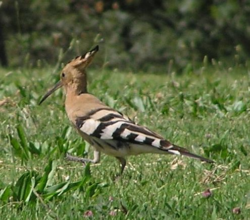 Upupa epops, taken in Jerusalem, Israel